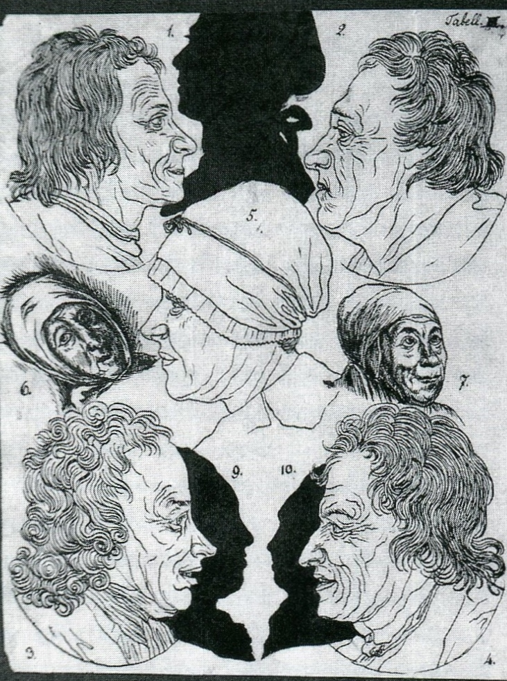 Vorlagezeichnung von Daniel Nikolaus Chodowiecki für die Physiognomik-Sammlung von Johann Kaspar Lavater